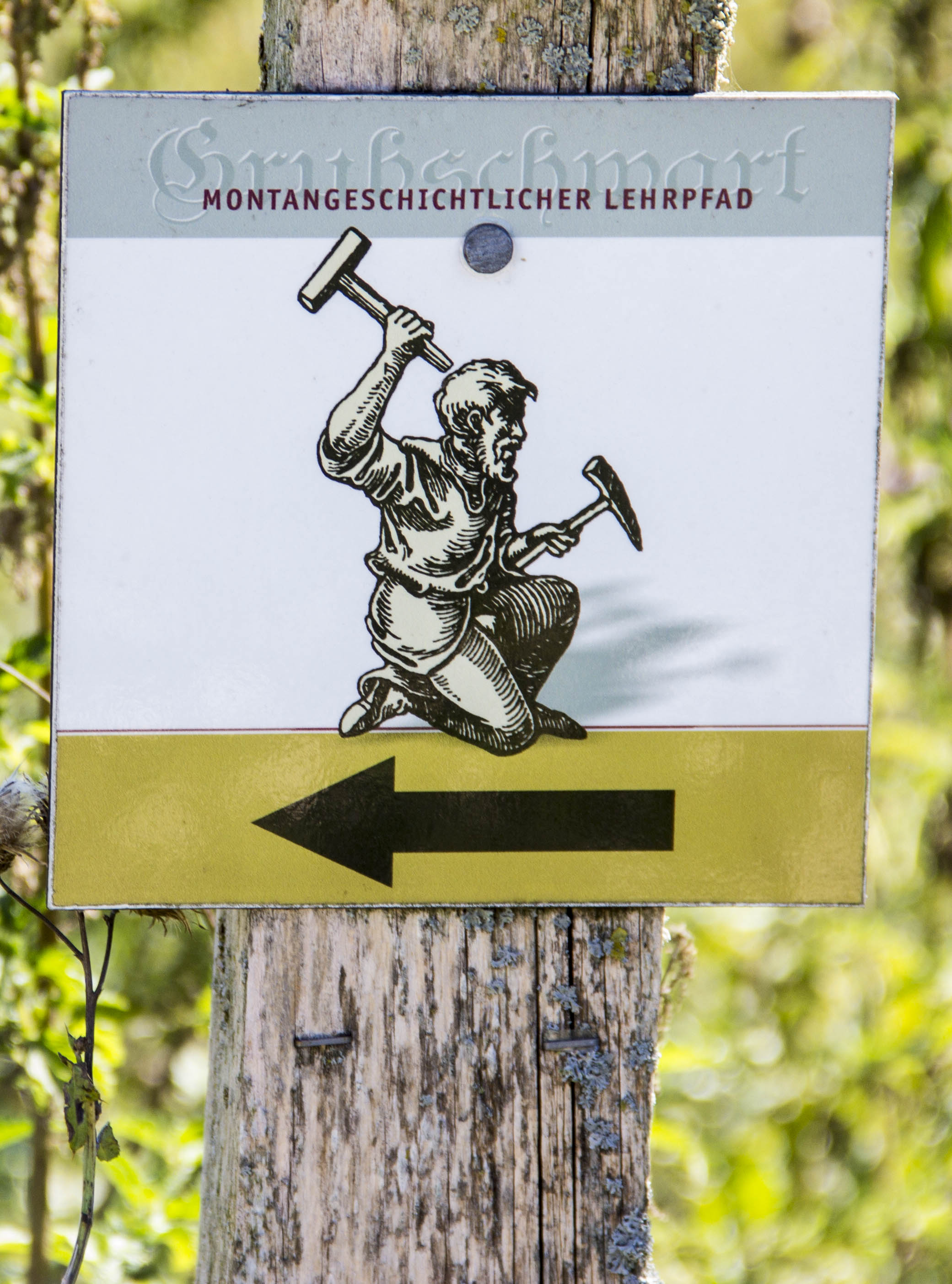 Grubschwart, ehemaliges Bergwerk, Höhle, Stollen, Raitenbucher Forst, Logo Montangeschichtlicher Lehrpfad Grubschwart